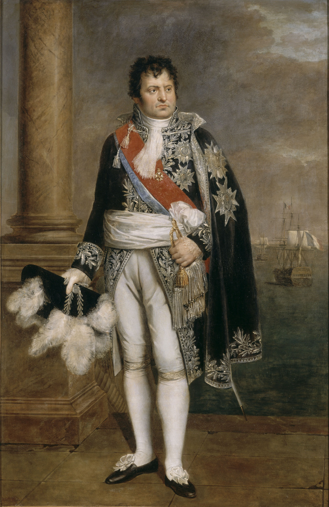 Vice Amiral Denis , Duc Decrès (1761-1820), Ministre de la Marine en 1801